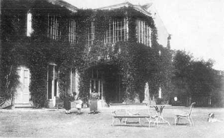 Замак Каштел у Темерину